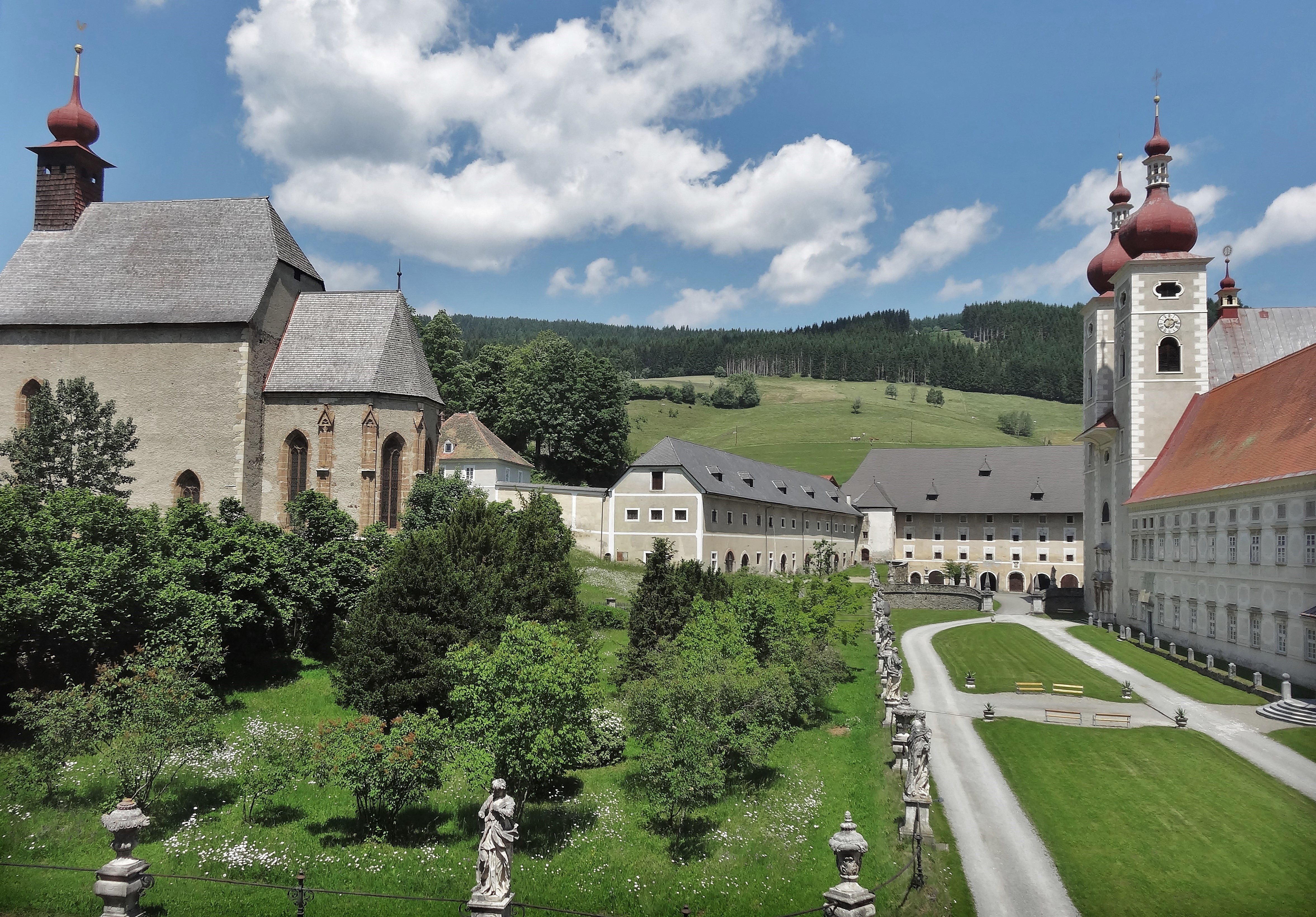 Benediktinerstift St. Lambrecht